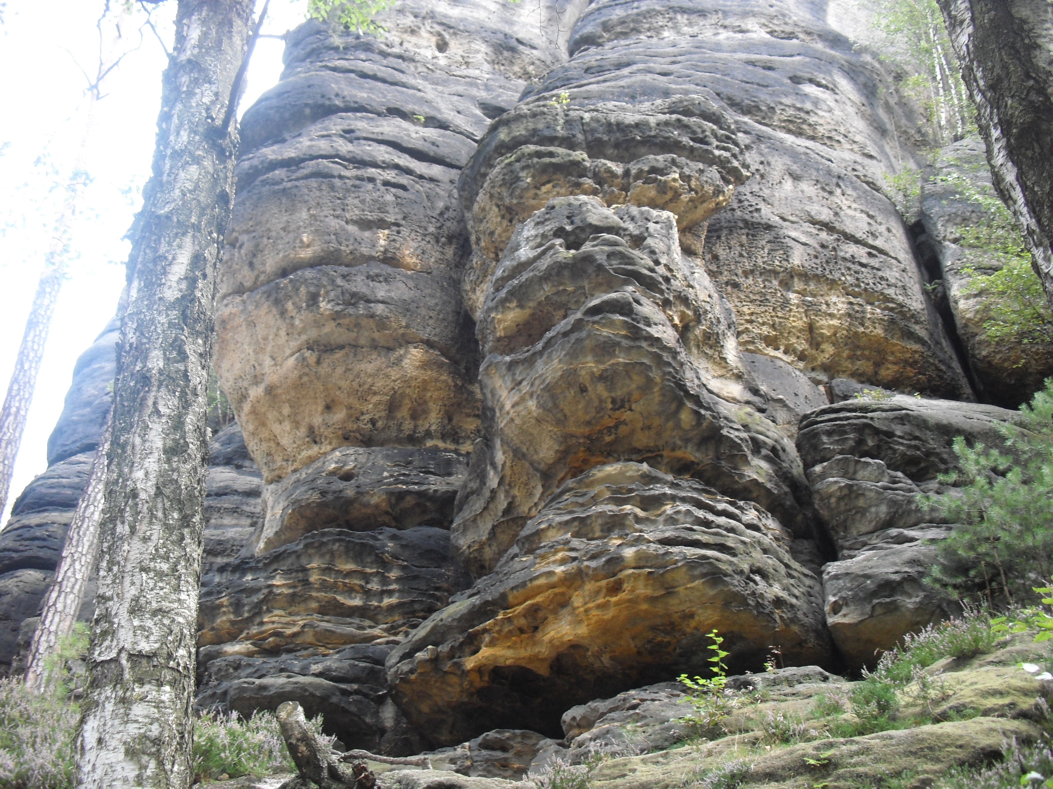 Sandstein an der Westseite des Pfaffensteins